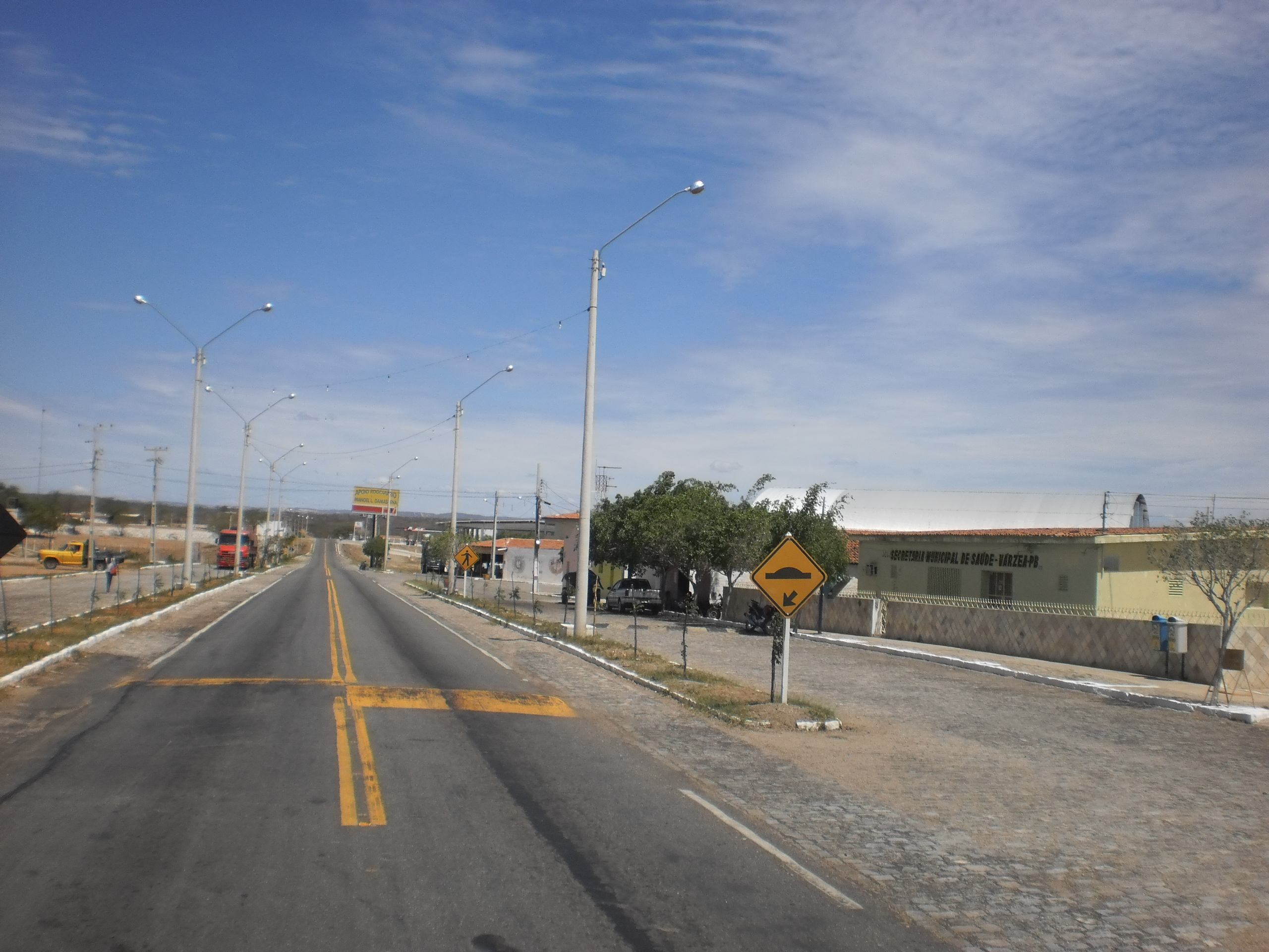 PB-233 em Várzea, Paraíba, Brasil. Saída para Santa Luzia-PB.